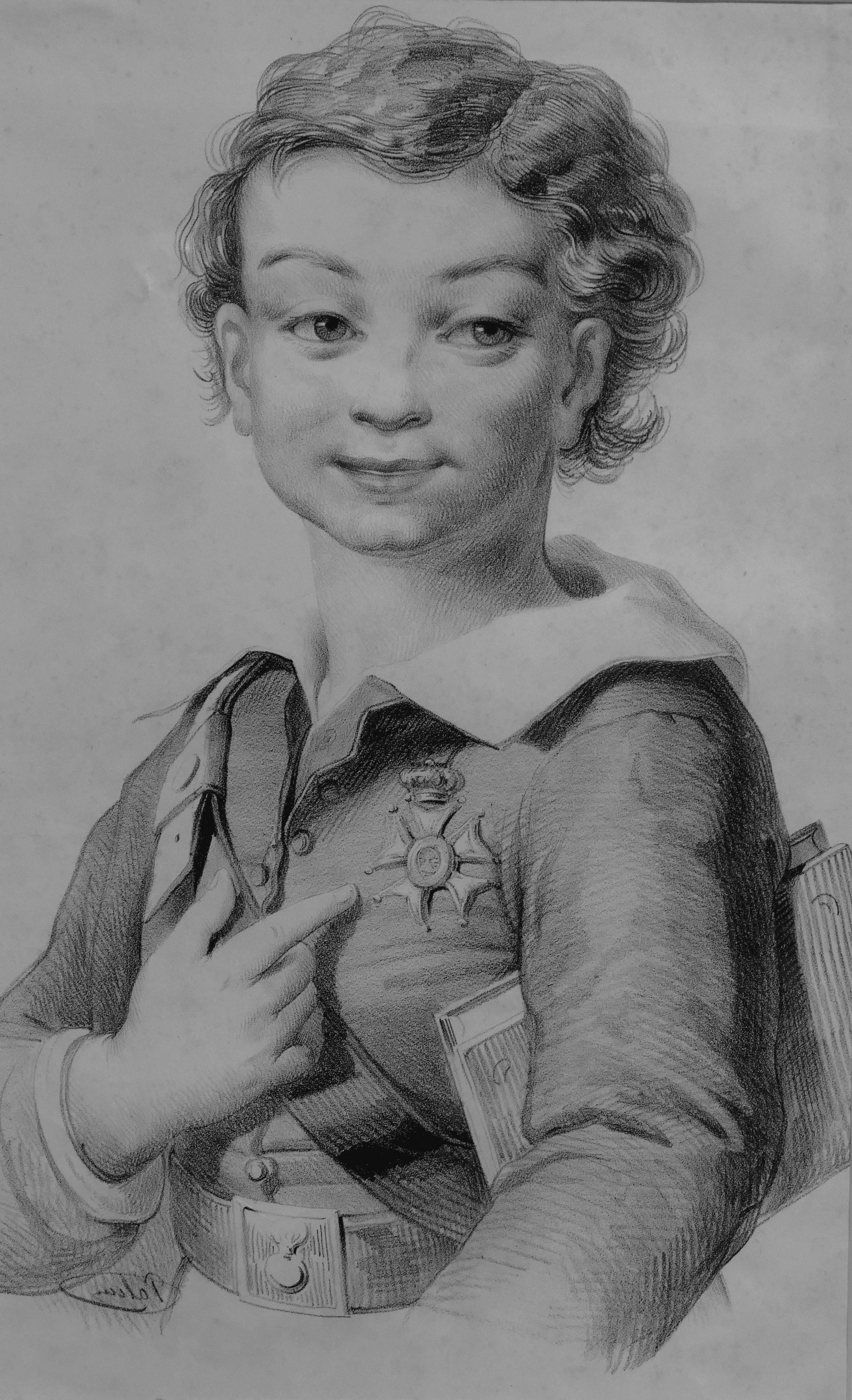 Dessin reproduit en lithographie. Petite étude aux deux crayons, vers 1860 (environ 30 x 15 cm) auteur inconnu. Un écolier en uniforme portant une croix d'honneur. Musée de l'éducation (Rouen).